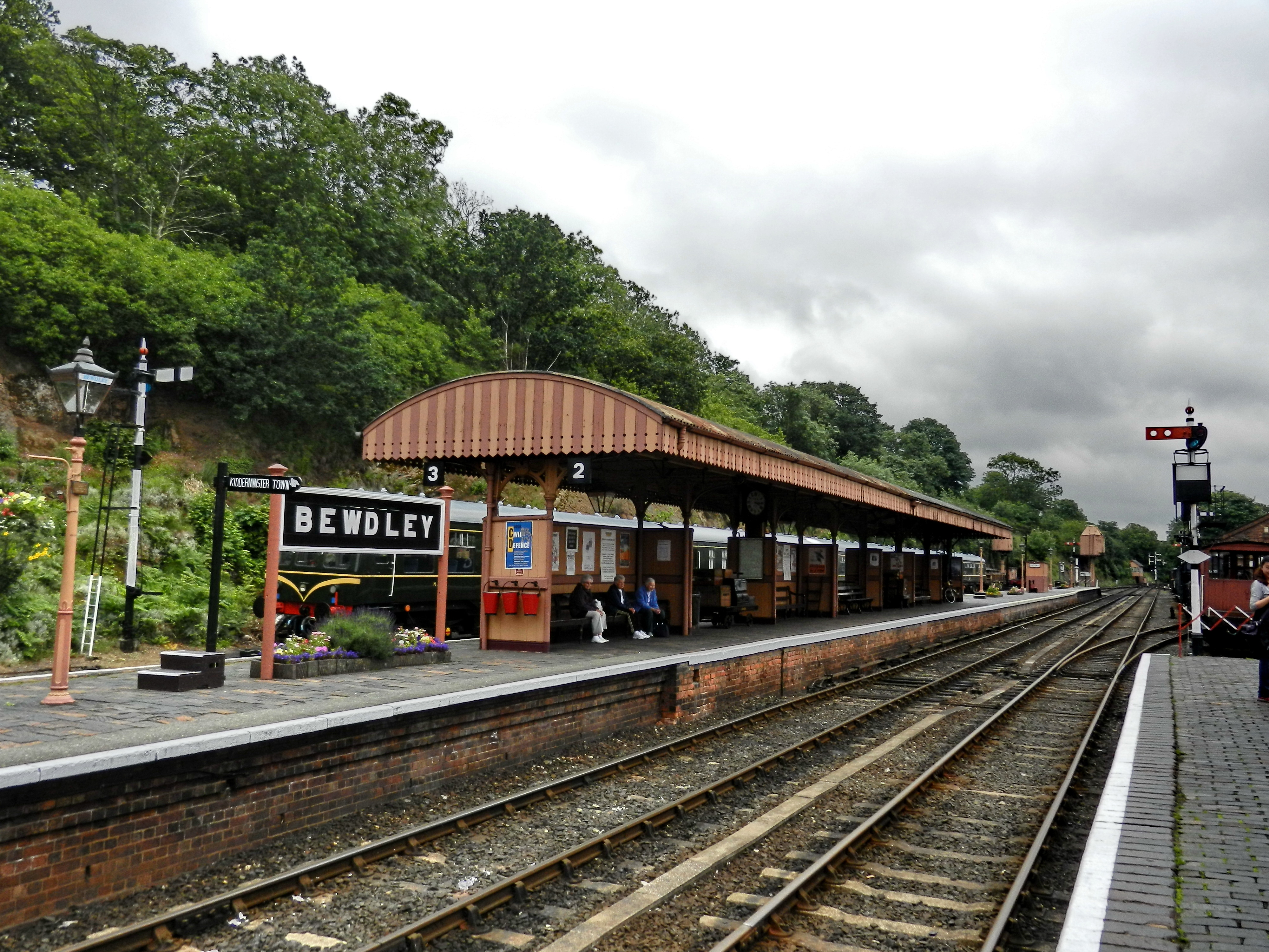 Bewdley